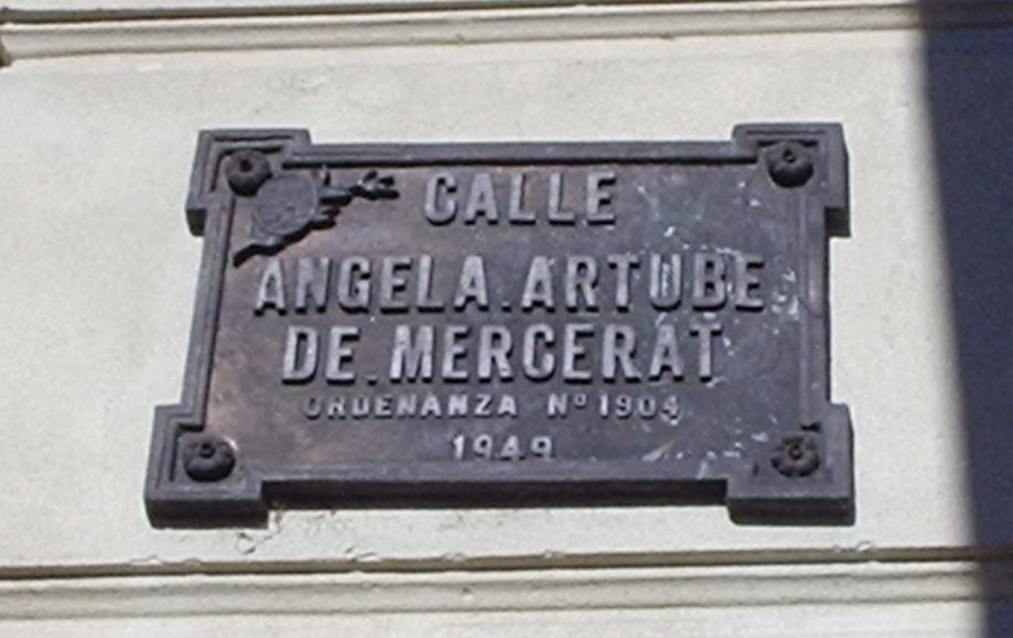 Placa en homenaje a Ángela Artube de Mercerat. Ubicada en 531 y 115, Tolosa, La Plata.